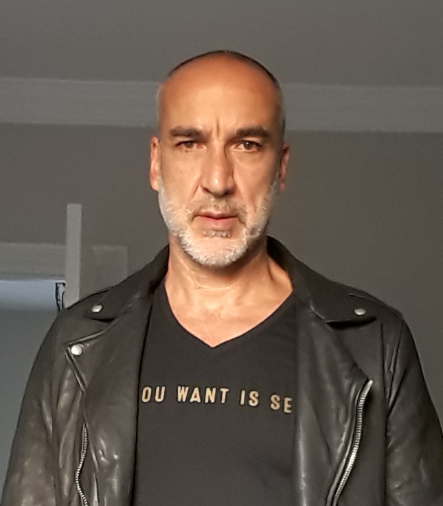 Retrato Fernando Arias